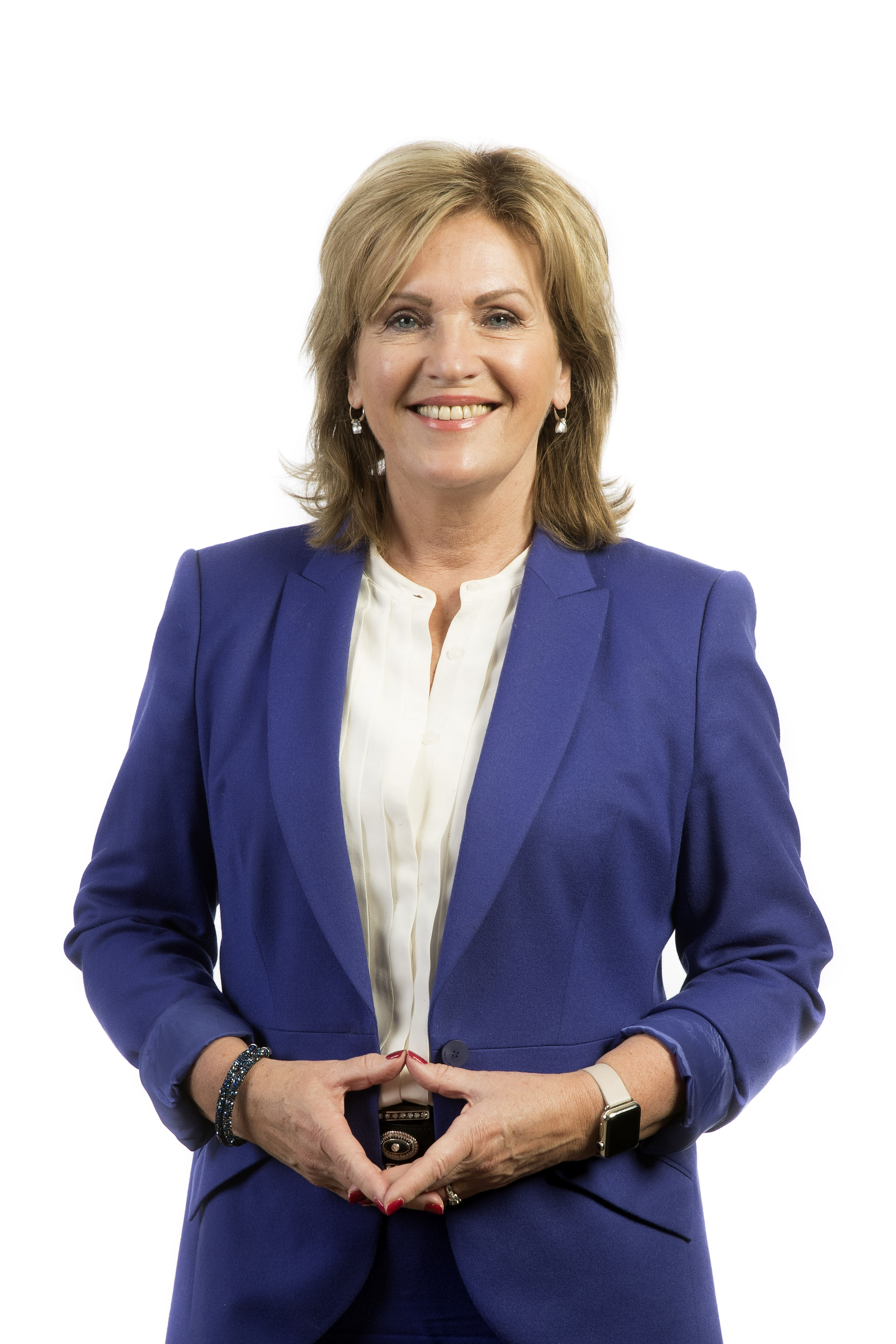 Pia Dijkstra